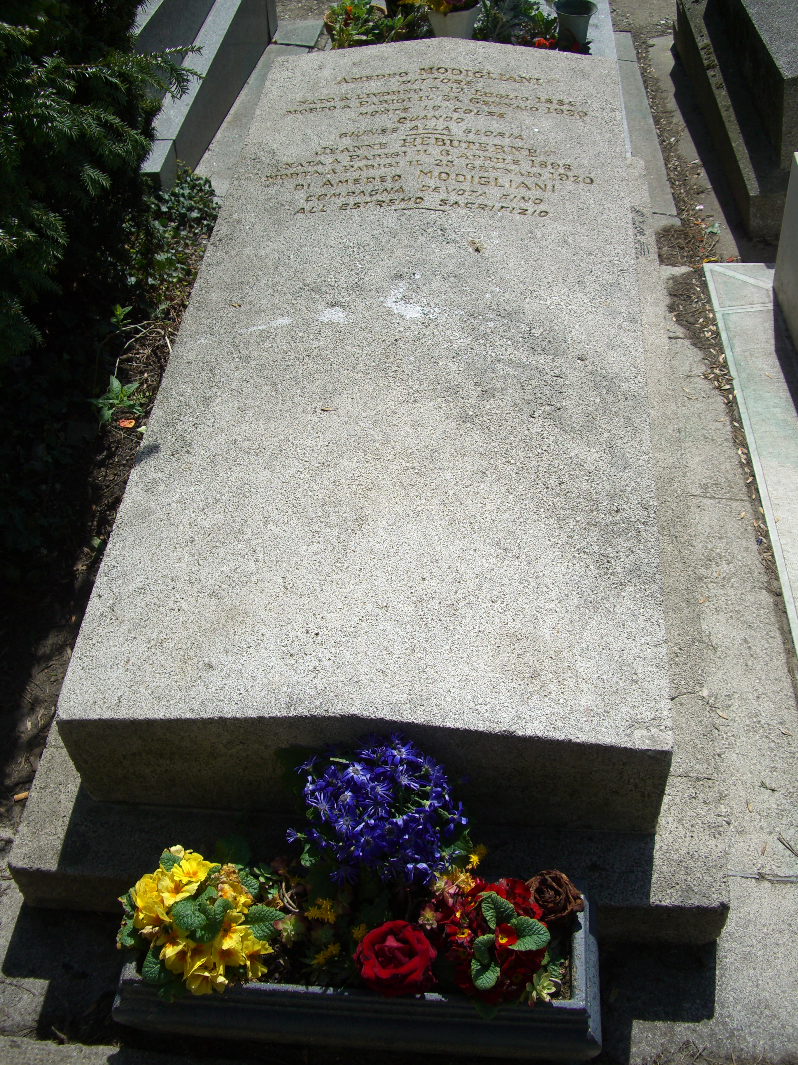 Надгробие Амедео Модильяни